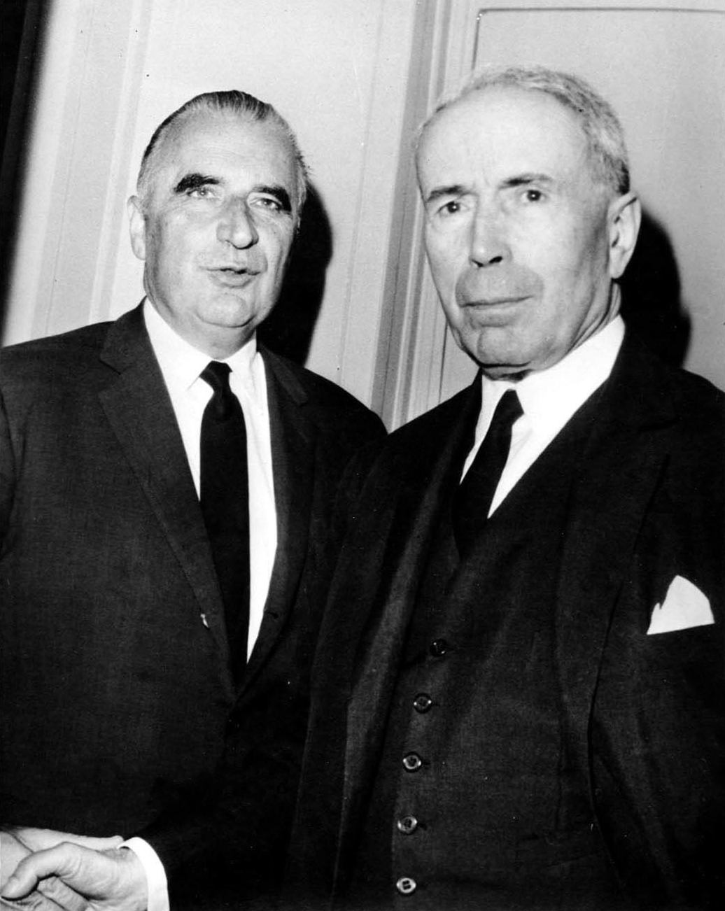 FOTOGRAFIA PRESS PHOTO VINTAGE 1969 ANTOINE PINAY CON GEORGES POMPIDOU, PARIGI